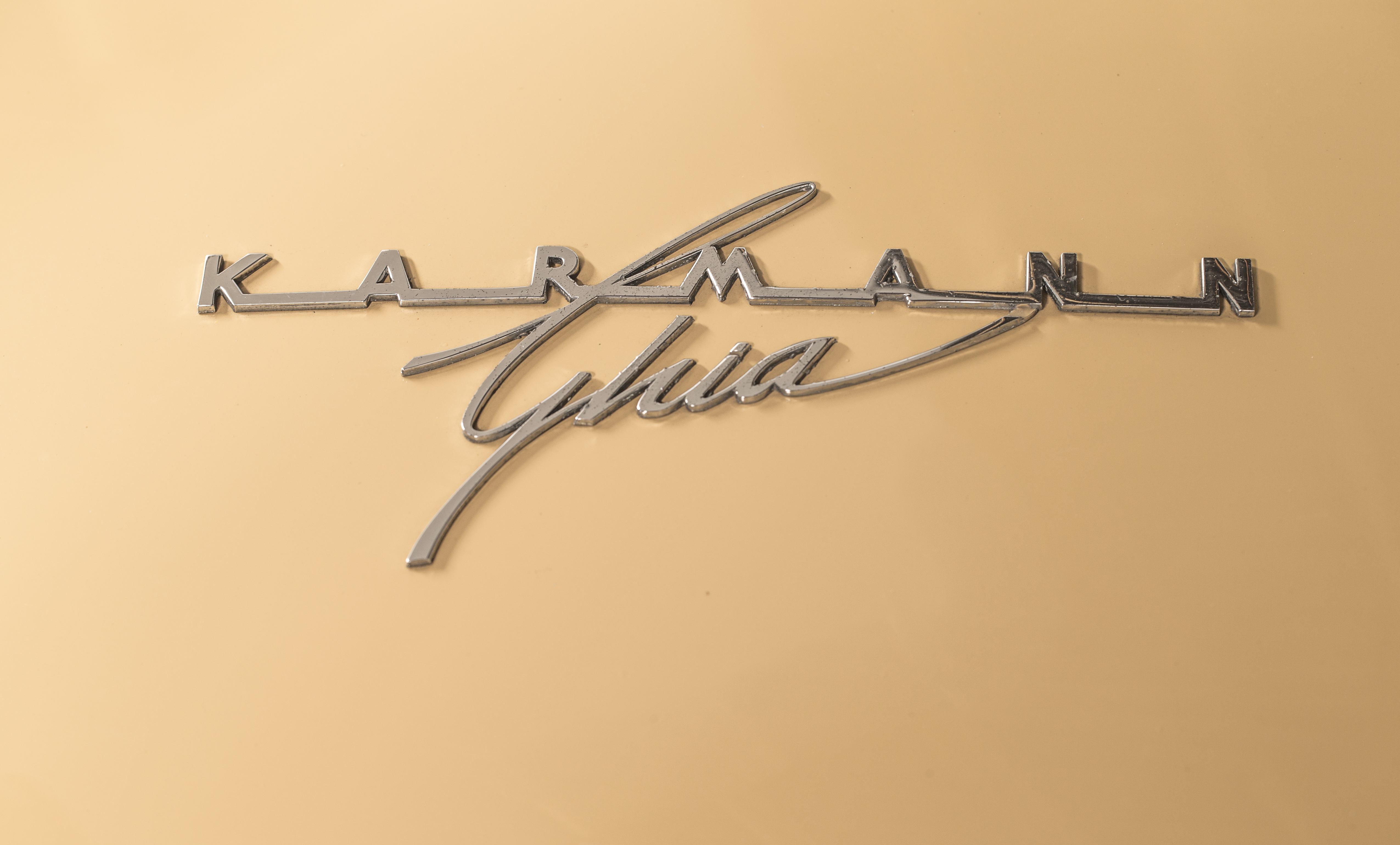 Karmann Ghia Schriftzug auf einem VW Karmann-Ghia Typ 14.